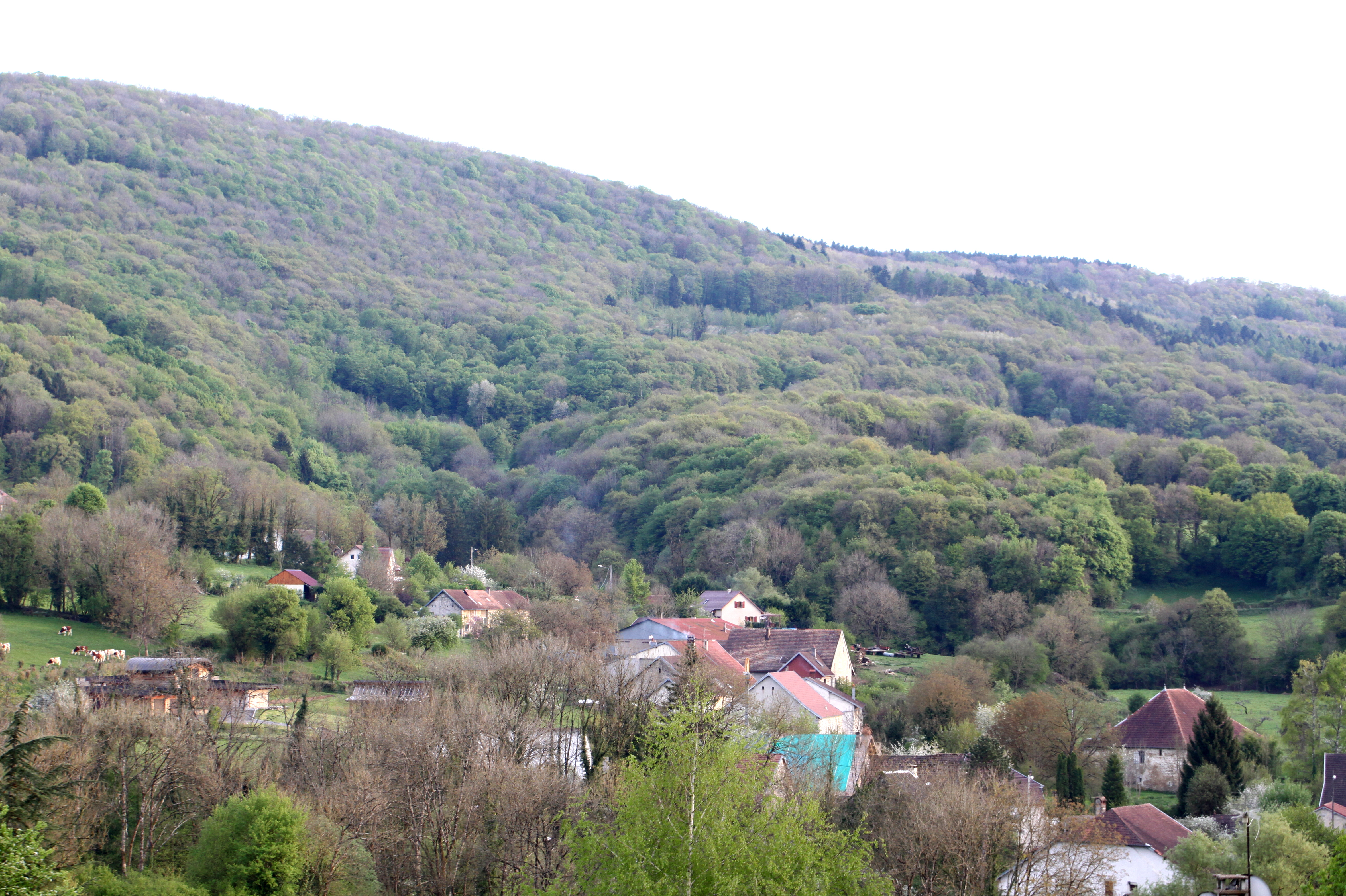 Vue de Ronchaux (Doubs).